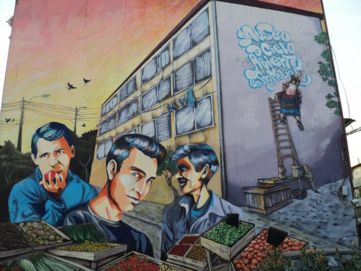 Grabado de la banda chilena Los Prisioneros de el Museo abierto al cielo en Avenida Departamental pasado Gran Avenida, San Miguel, Santiago de Chile.